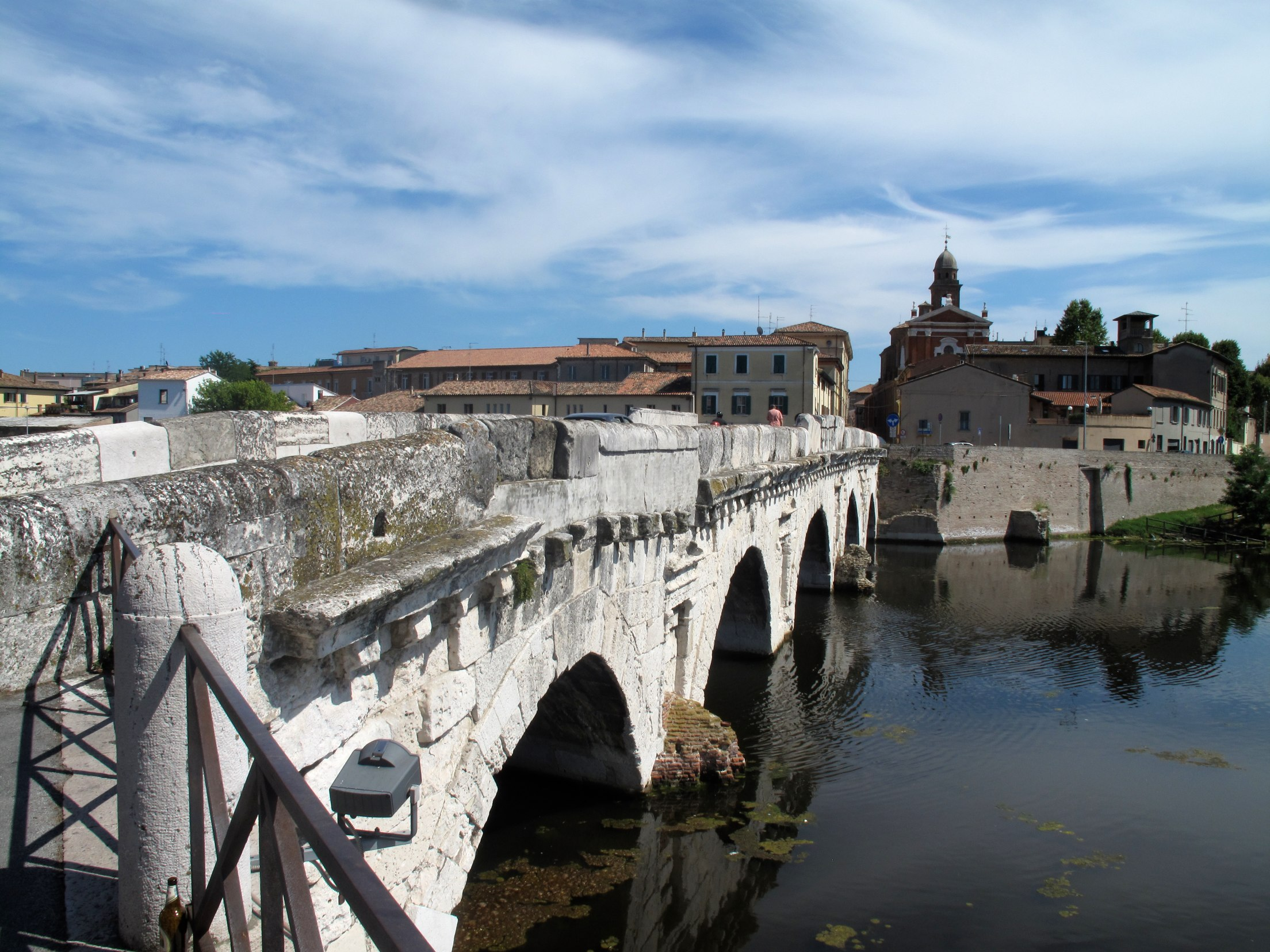 visite vieille-ville de Rimini juillet 2010